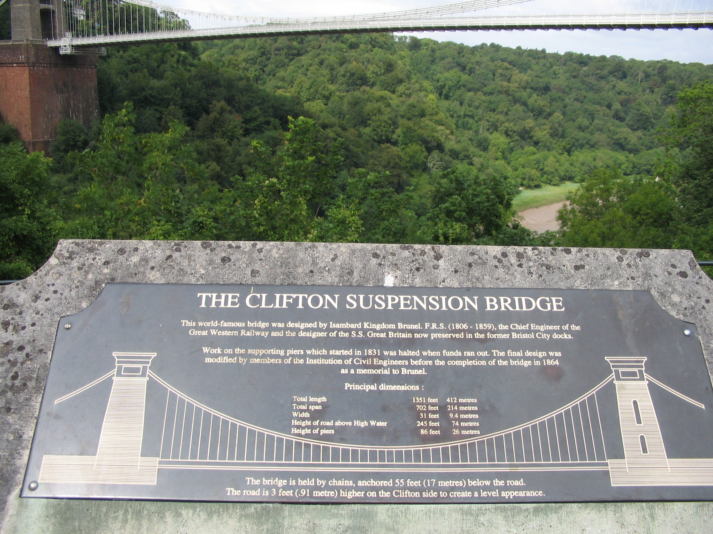 Clifton Suspension Bridge - Bristol - herdenkingsplaat - eigen foto - augustus 2006